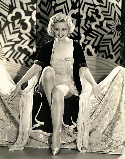 Adrienne Dore